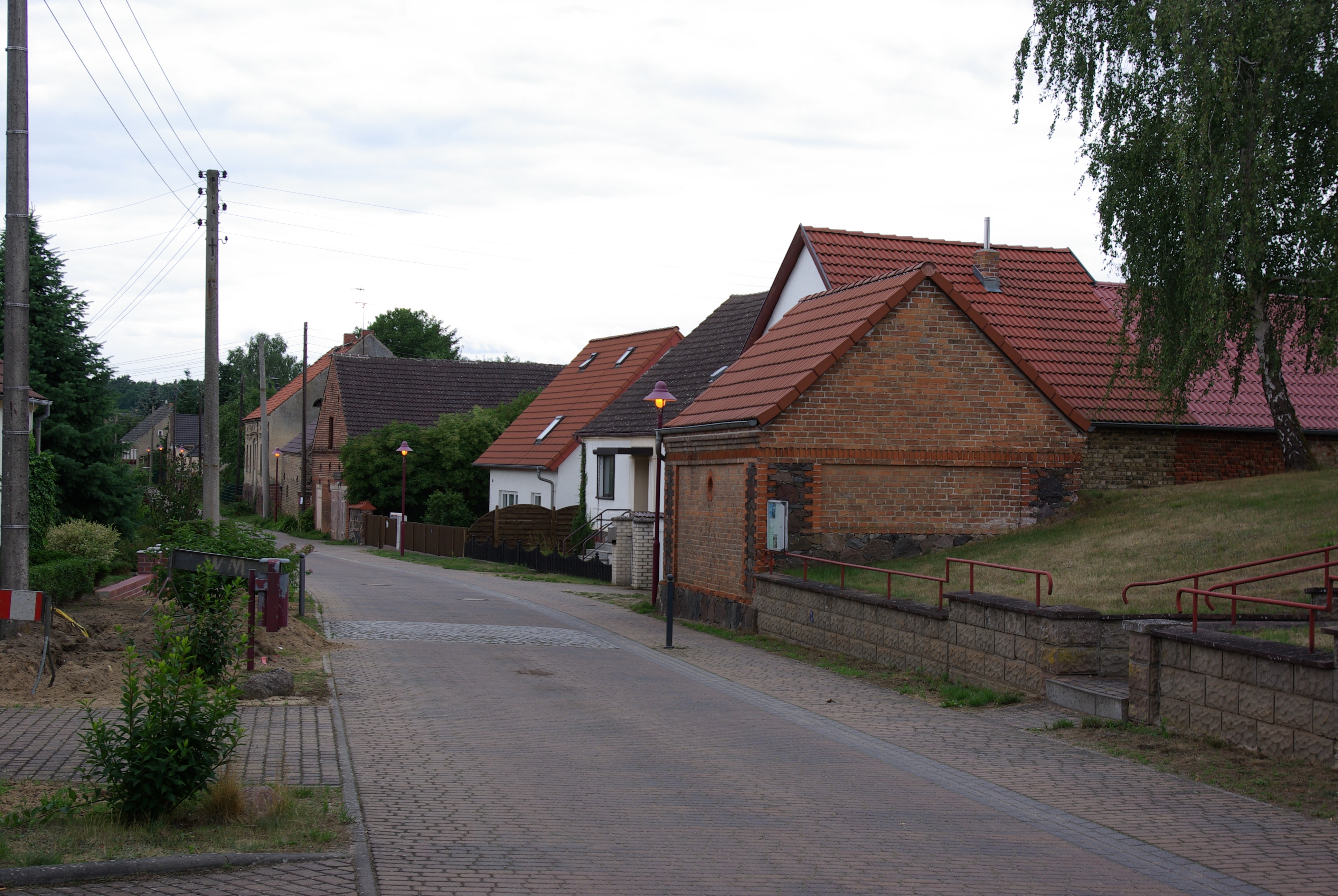 Müncheberg, Ortsteil Hoppegarten. An der Straße Zum Stadtweg liegt die Kirche.